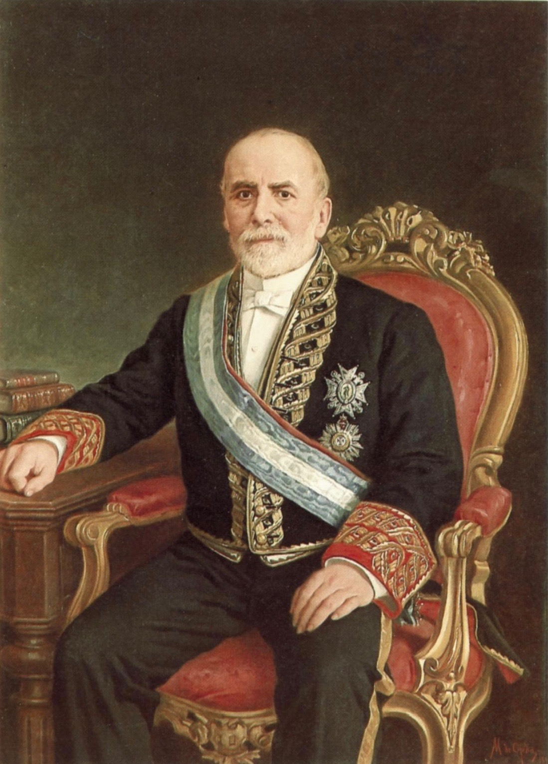 Juan Francisco Camacho de Alcorta